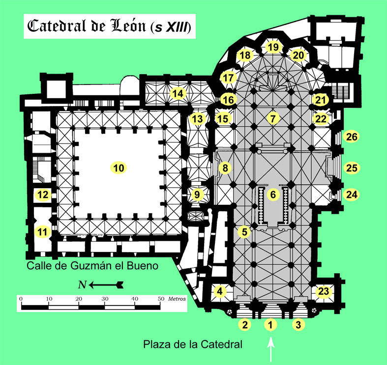 Planta, Catedral de León, España, gótica (s XIII)